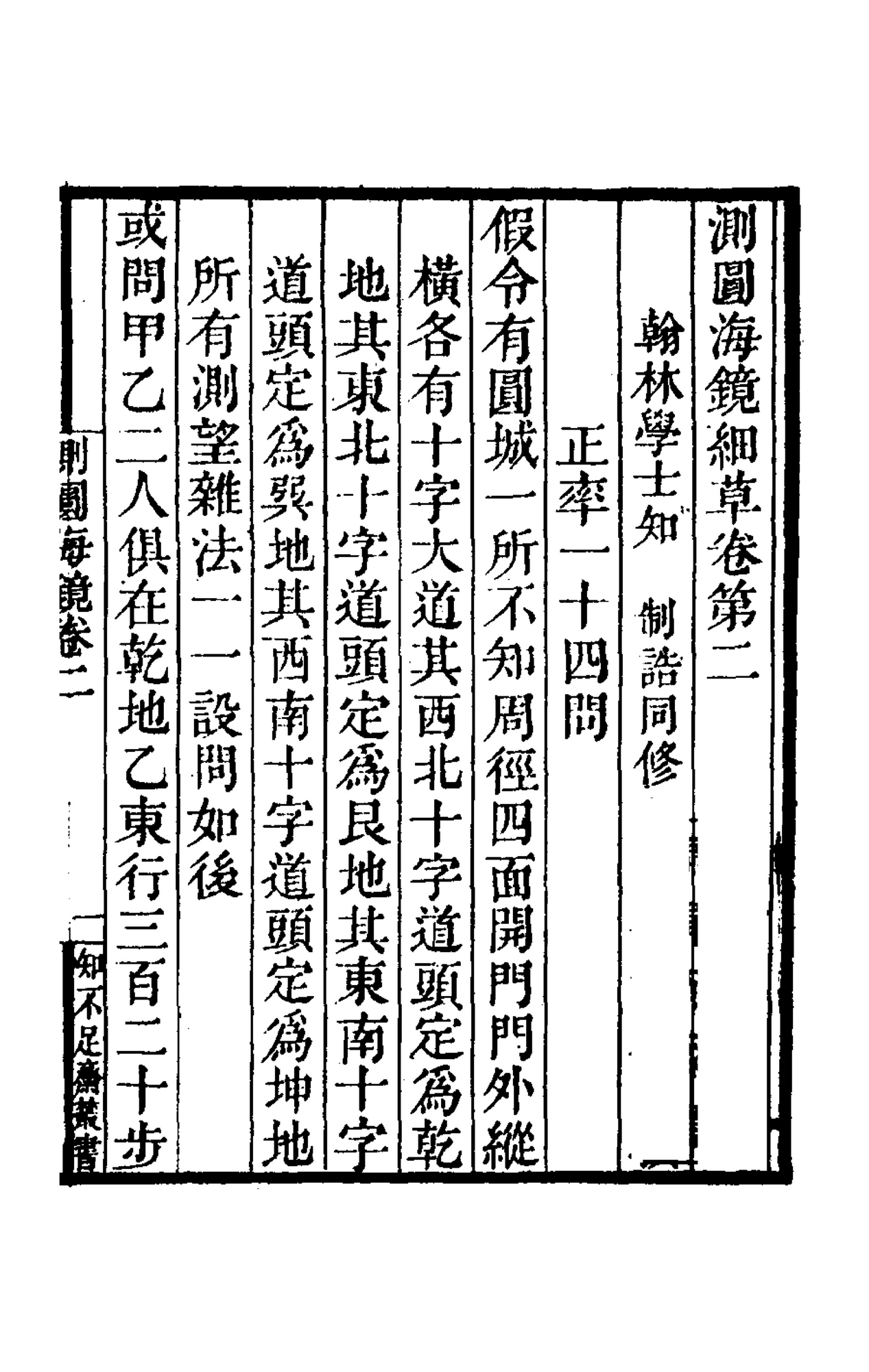 测圆海镜卷二 正率